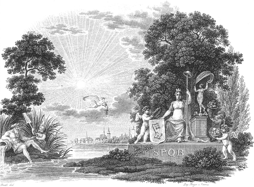 Bildvorlage von Anton Radl (1774–1852) aus dem Jahr 1818/1819: Titelseite zum Buch Adam Storck. SPQB=Senatus Populusque Bremensis (Senat und Volk von Bremen)